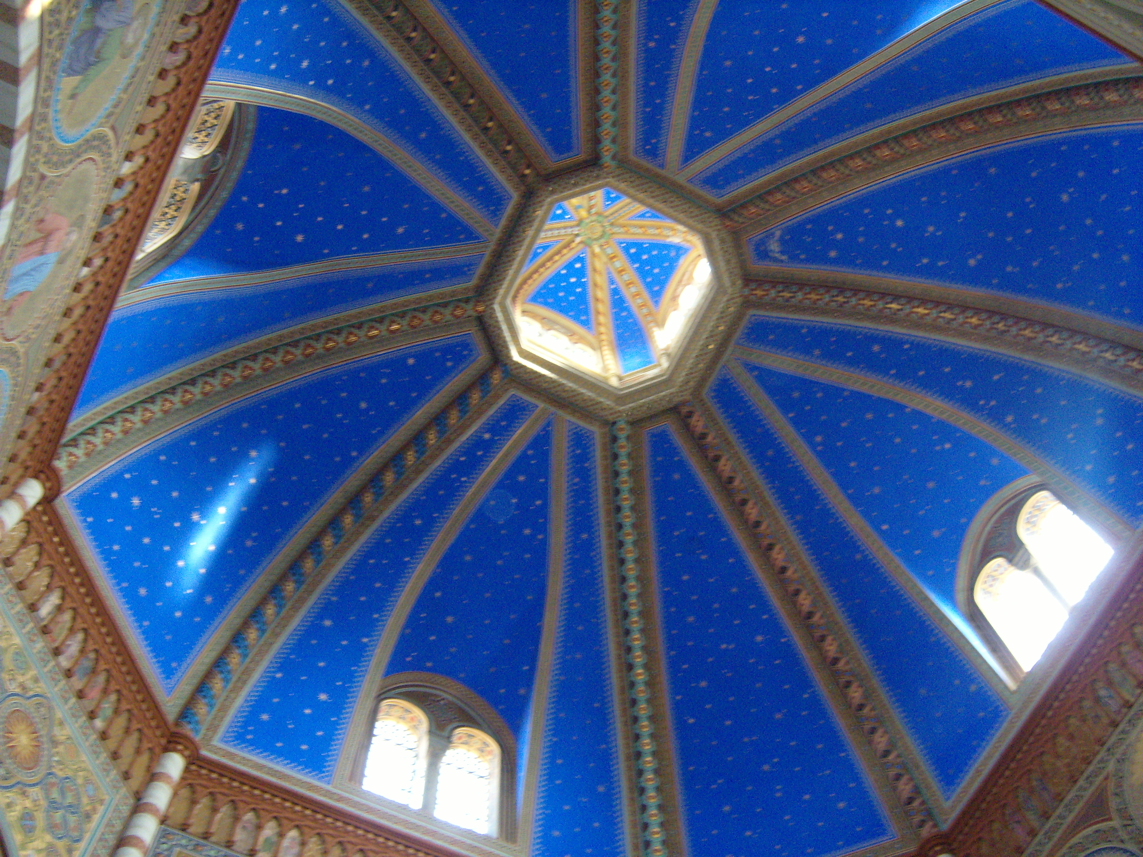 Soncino, Mantova.